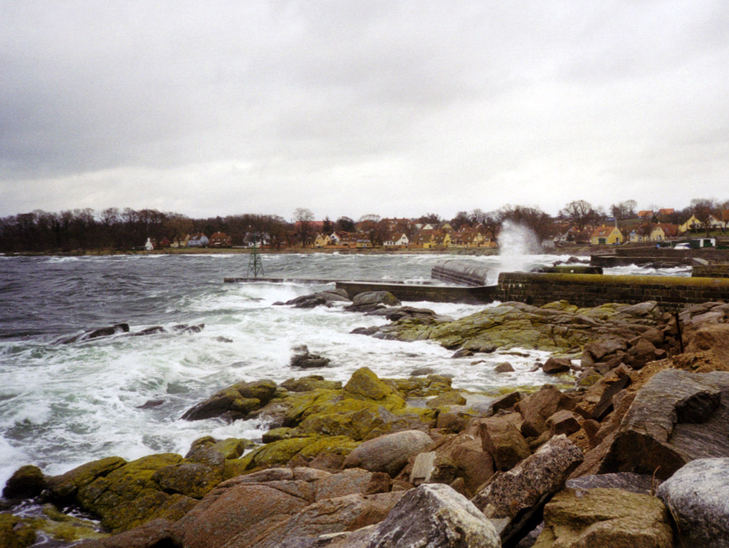 Hafen der Kleinstadt Tejn im Norden von Bornholm originally uploaded on de.wikipedia by Benutzer:Darkone at 23:47, 7. Nov 2004. Filename was Tejn Hafen.jpg.